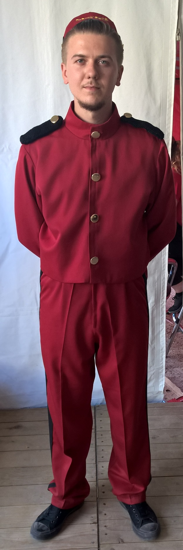 Un homme habillé avec le costume du personnage de Spirou.